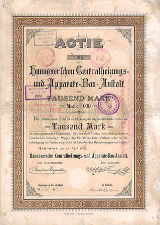 Aktie mit Datum vom 17. April 1899 der 1884 gegründeten Hannoverschen Centralheizungs- und Apparate-Bau-Anstalt, mit Faksimile-Unterschrift des Barons von Königswarter. Das Unternehmen wurde 1903 umfirmiert in Centralheizungswerke AG, ging 1926 in das Vergleichsverfahrung und wurde anschließend liquidiert. Das Fimengrundstück in Hannover-Hainholz in der Hüttenstraße 23 wurde 1927 an die AG für Heizung und Lüftung, Hannover (vorm. Fritz Kaeferle) versteigert ...